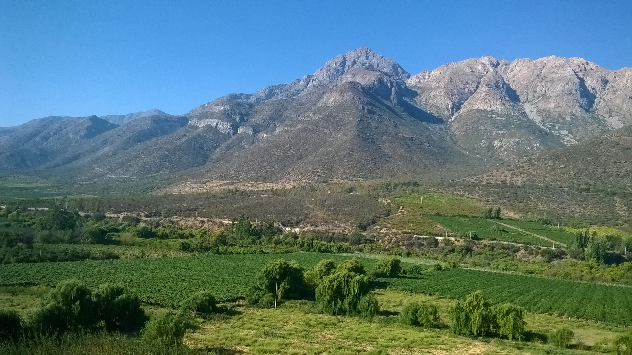 Vista del valle del río Choapa en Punta Nueva, cerca de Salamanca, Chile.